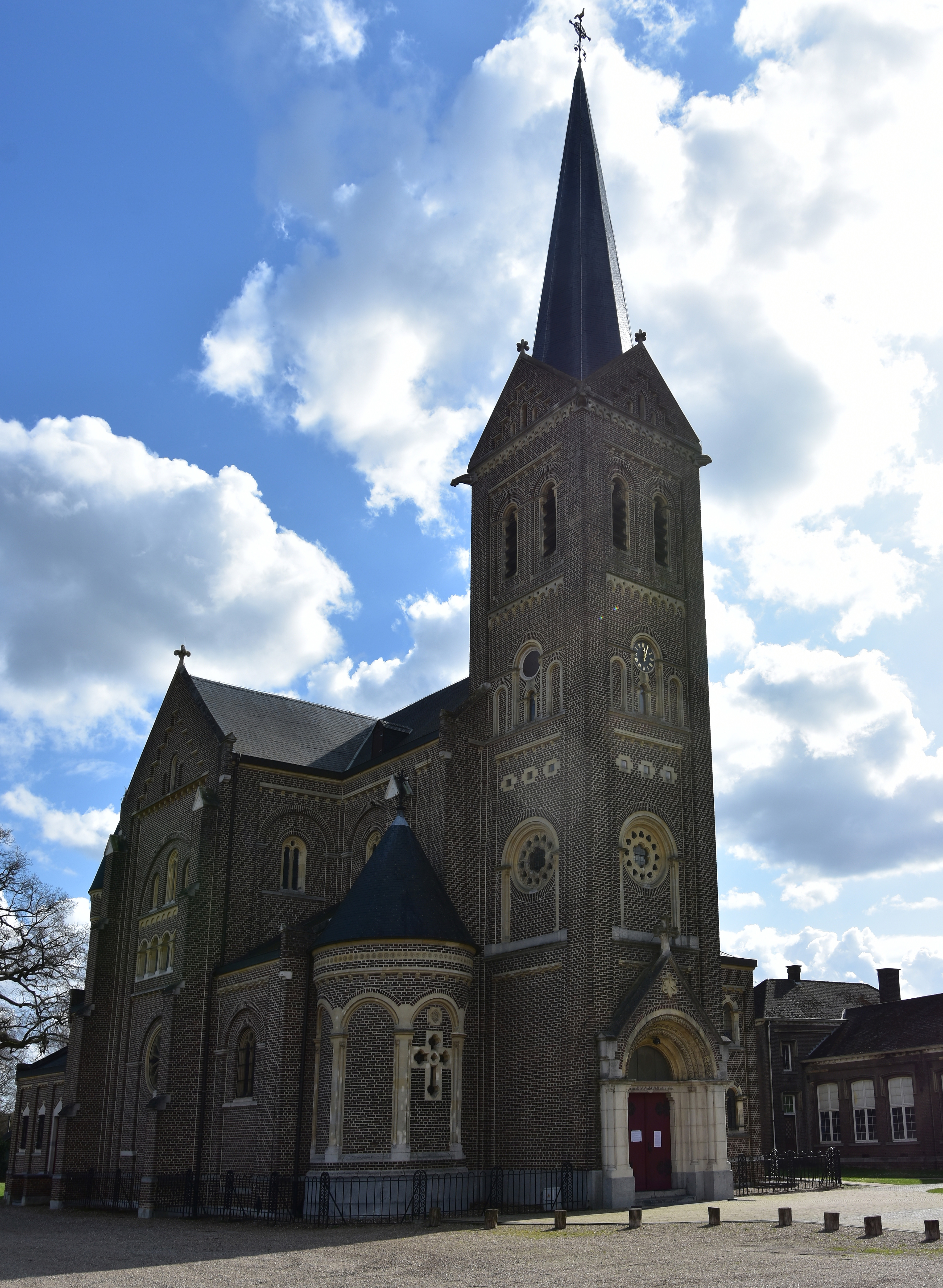 Sint-Pieterskerk (Leut) (1235) 15-03-2020 12-02-41